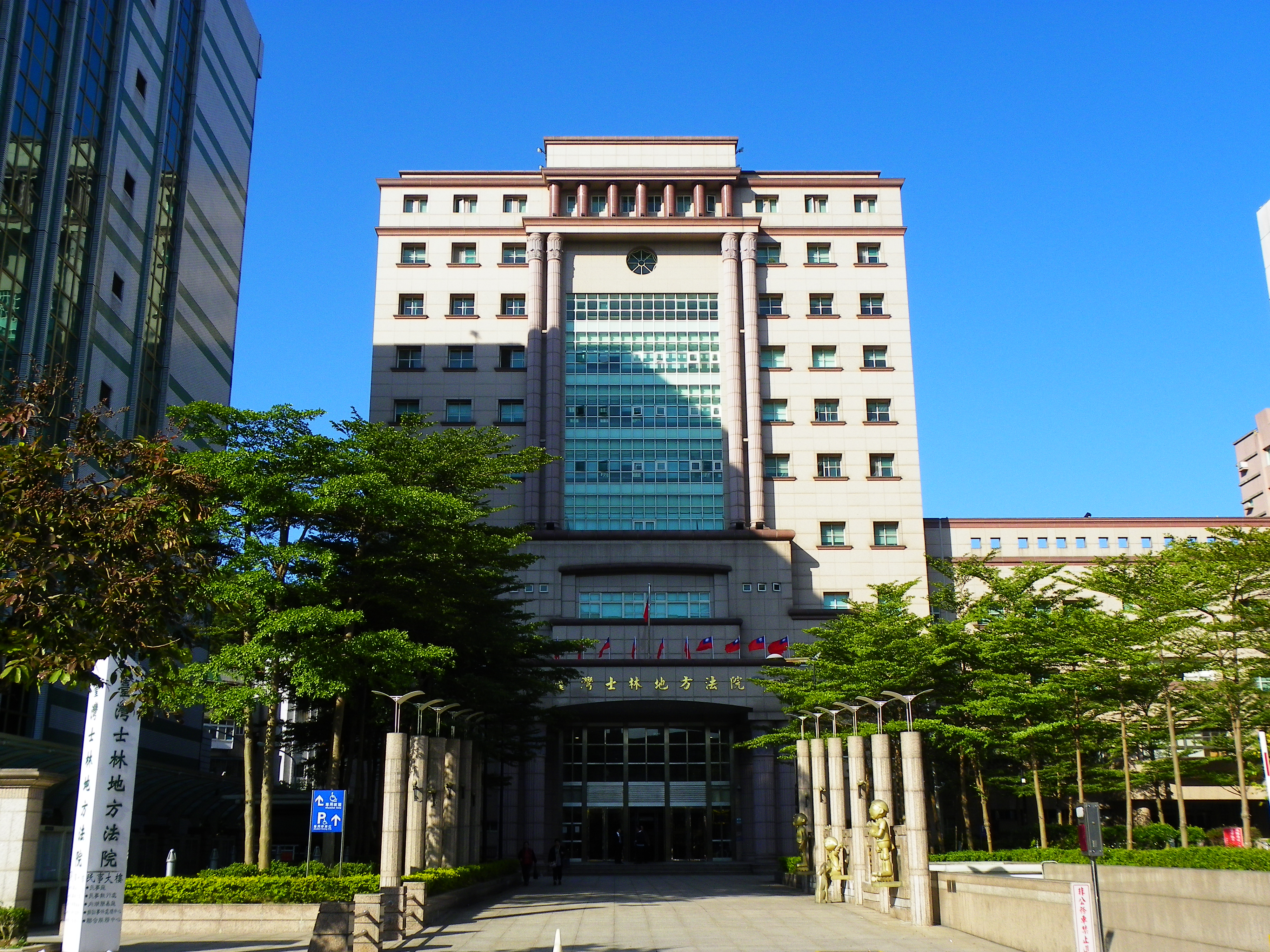 臺灣士林地方法院民事大樓，地址：臺北市內湖區民權東路六段89、91號。